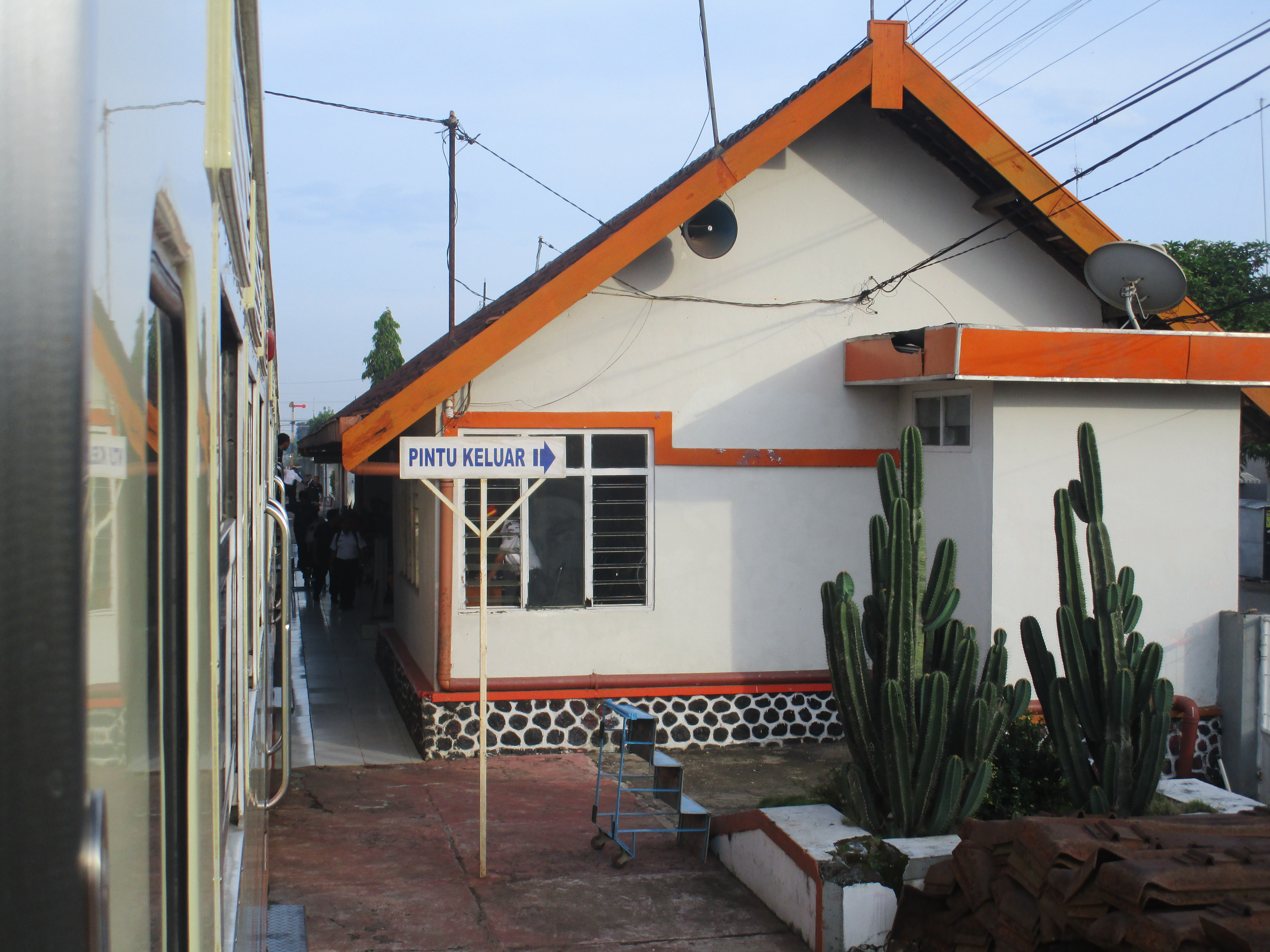 Stasiun Walikukun